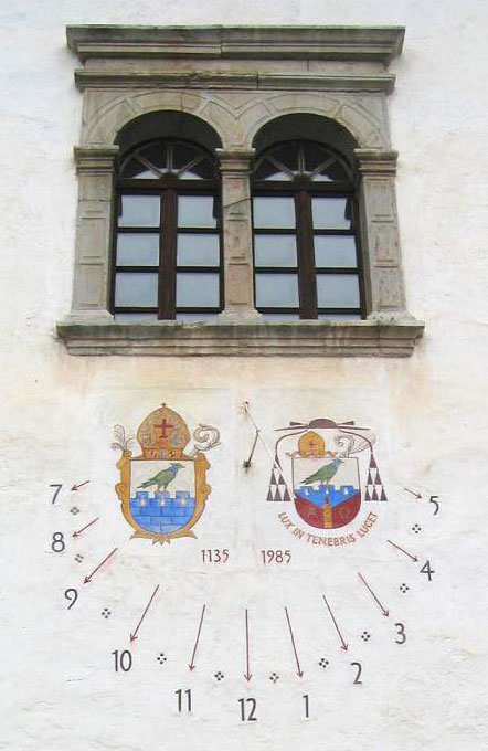 Monastery Sittich, Slovenia / samostan Stična, Slovenija / Kloster Sittich, Slowenien